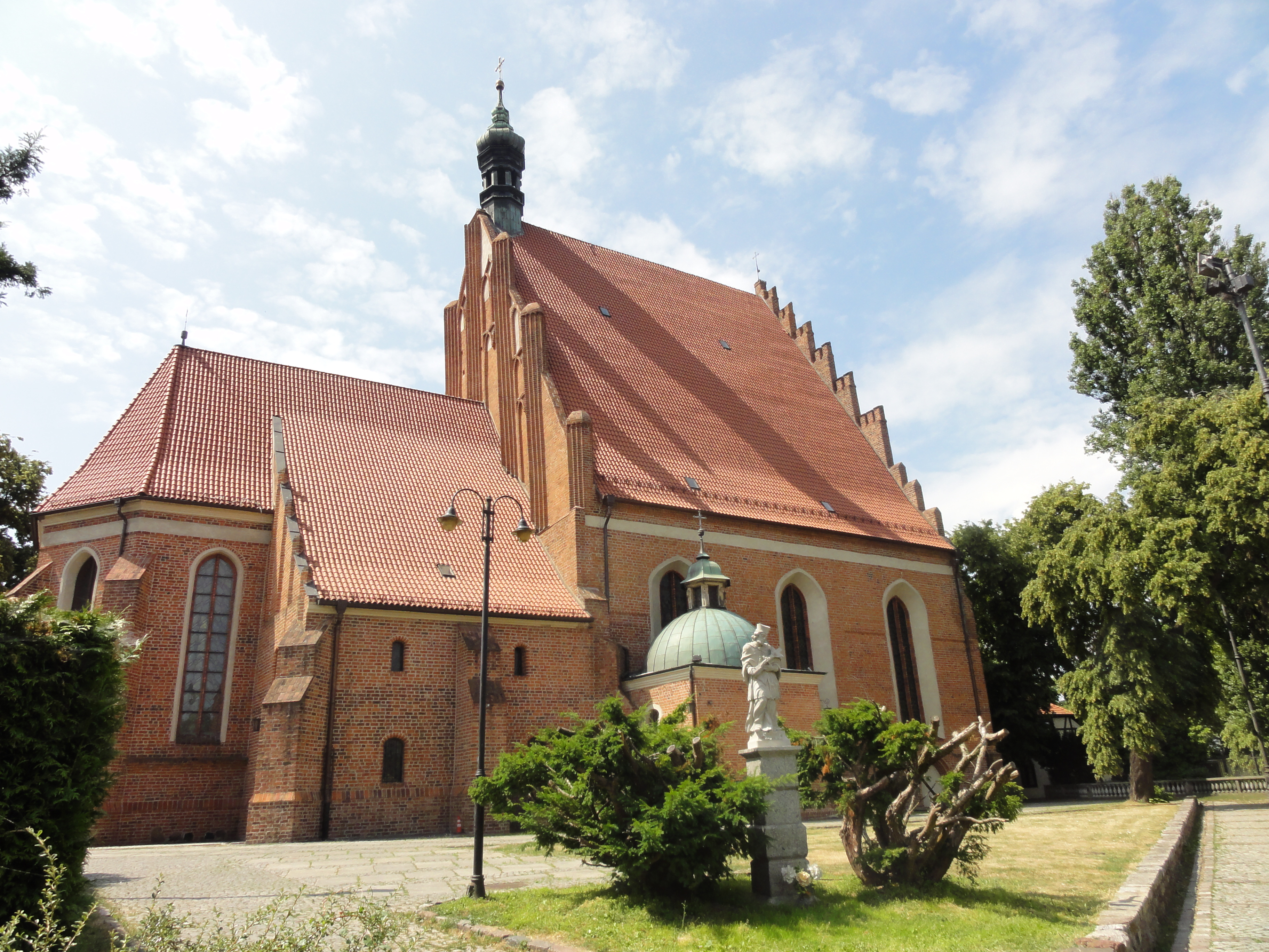 Bydgoszcz, Katedra św. Marcina i Mikołaja w Bydgoszczy